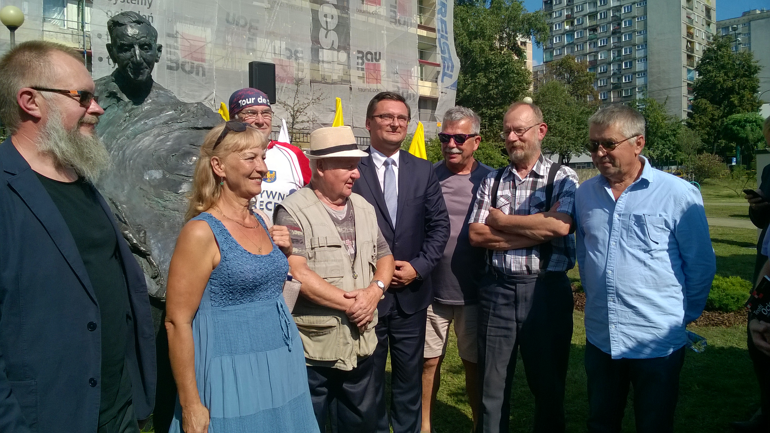 Na zdjęciu od lewej; Jacek Kiciński-autor rzeźby,Sabina Pasoń -malarka i zarazem kierownik Grupy Janowskiej, Erwin Sówka - nestor Grupy Janowskiej, Marcin Krupa - prezydent miasta Katowice, oraz malarze Grupy Janowskiej Zdzisław Majerczyk, Piotr Porada, Grzegorz Haiski, Jan Jagoda.